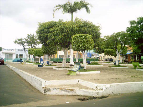 Foto da Praça Texeira de Freitas em Dom Pedro - MA